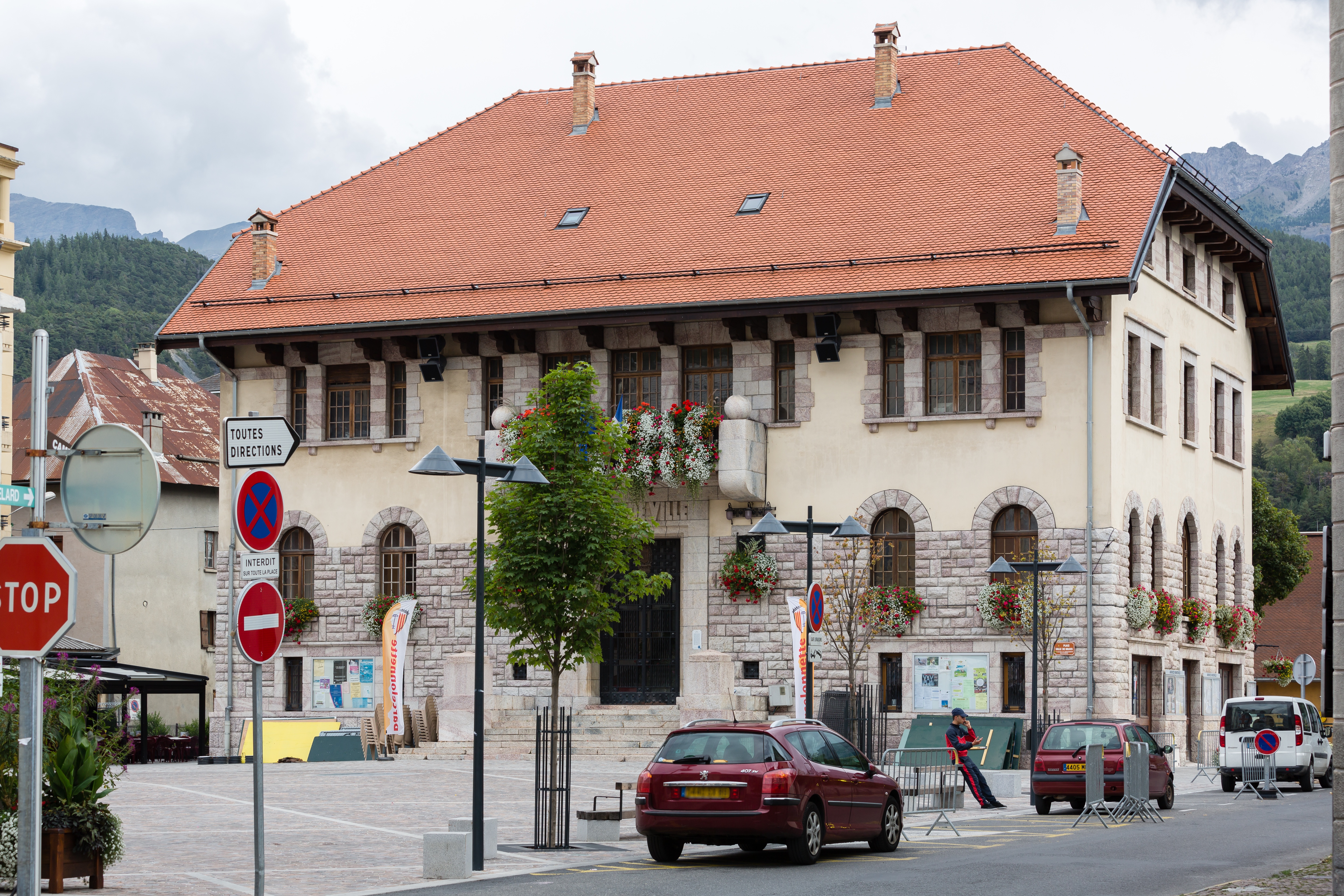 La mairie de Barcelonette (France).